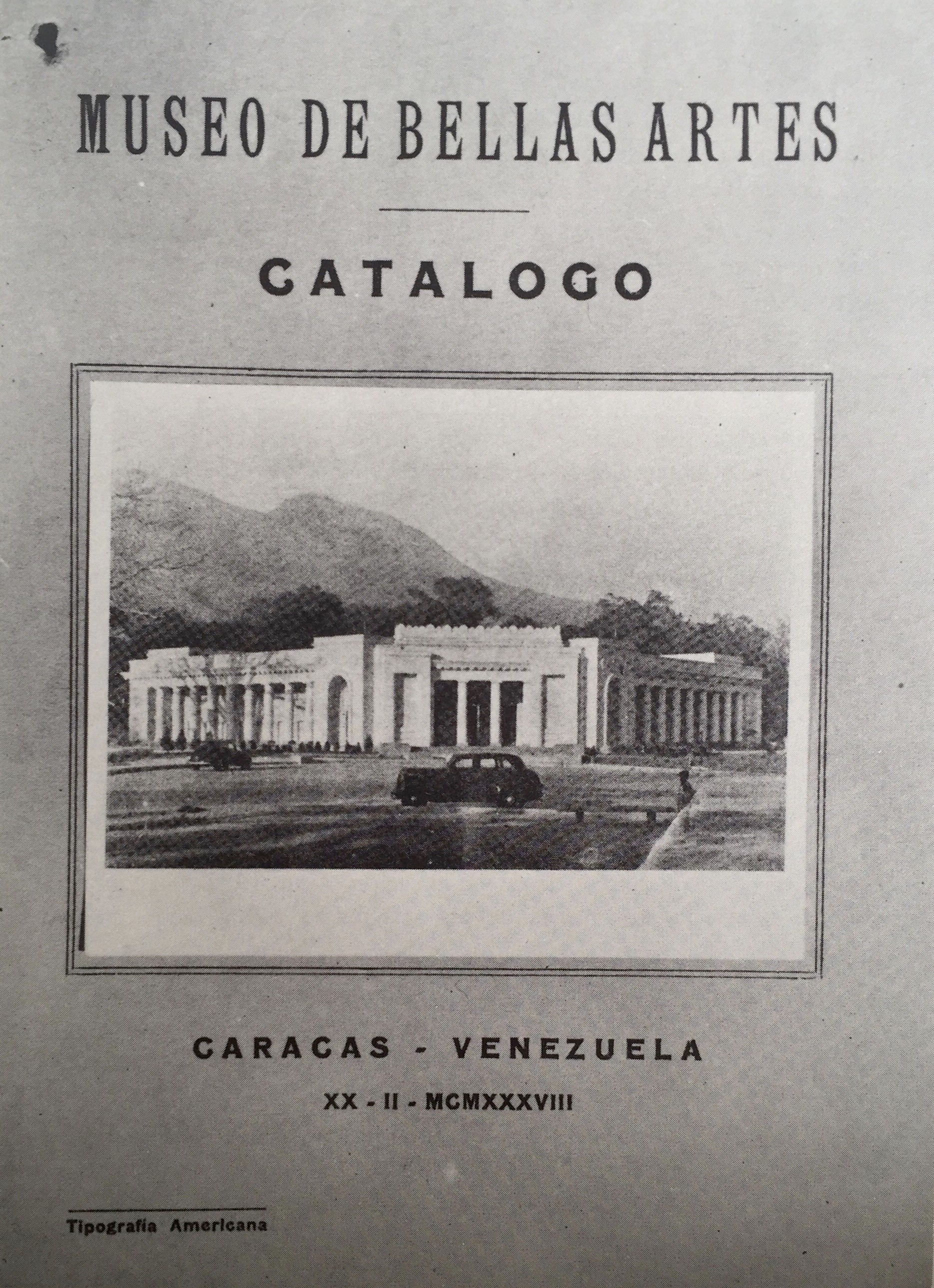 Primer catálogo del Museo de Bellas Artes de Caracas, publicado en 1938.